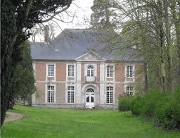 Abbaye de Saint-Valery-sur-Somme, logis abbatial 2